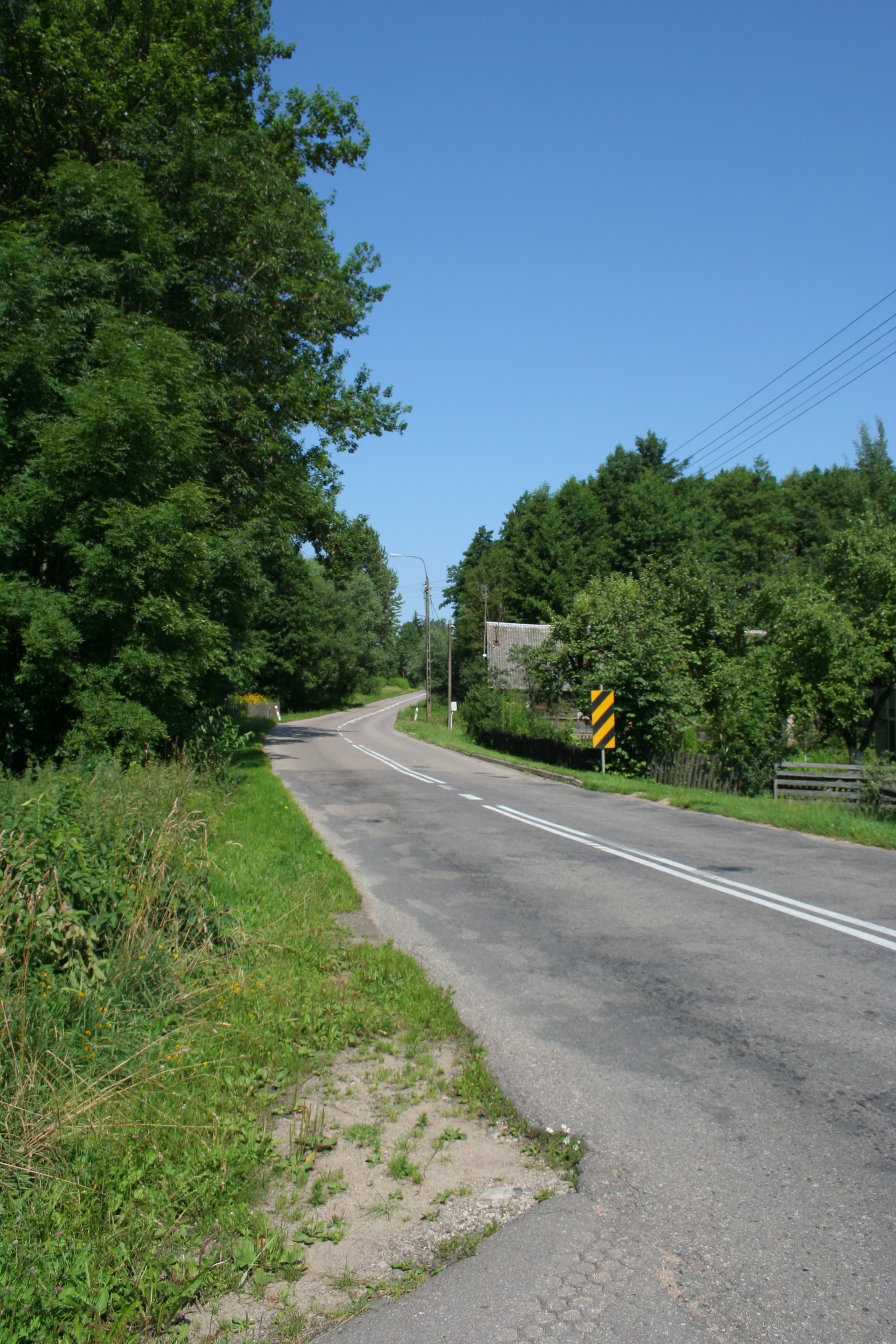 Droga wojewódzka 673 przez wieś Bierwicha